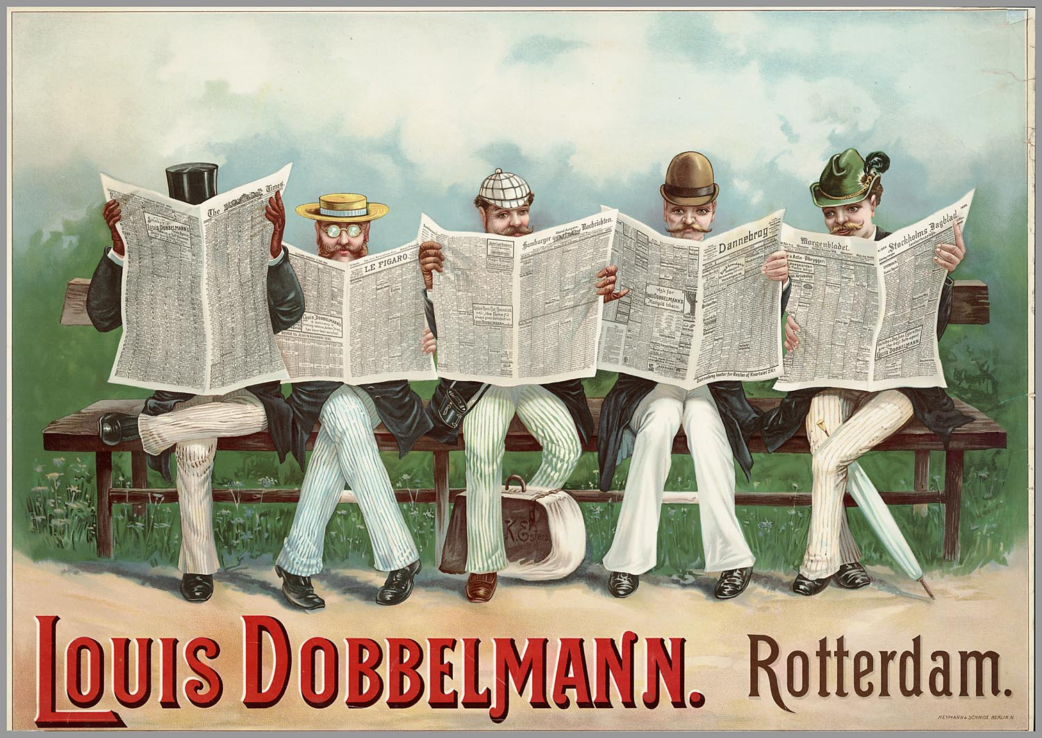 Advertentie: Louis Dobbelmann. Rotterdam.